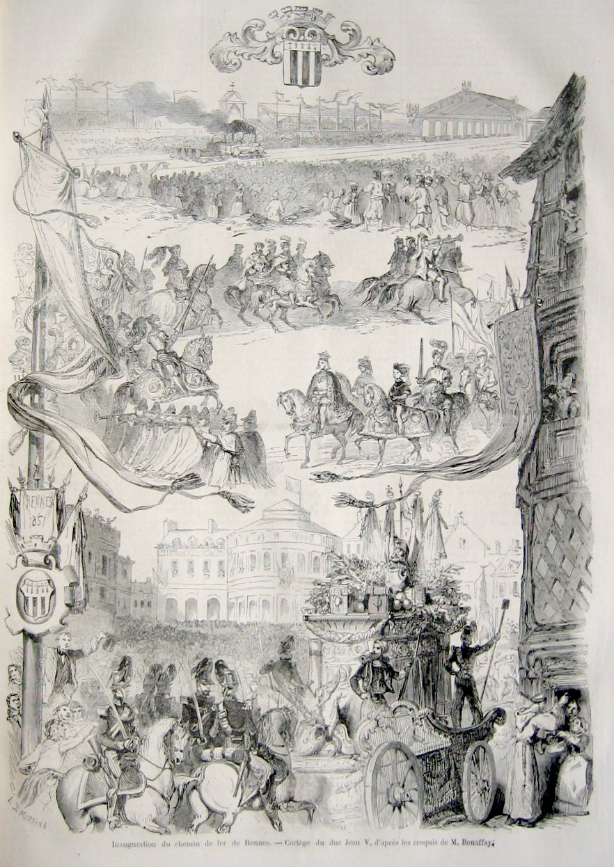 Inauguration du chemin de fer de Rennes. - Cortège du duc Jean V, d'après les croquis de M. Bonaffay